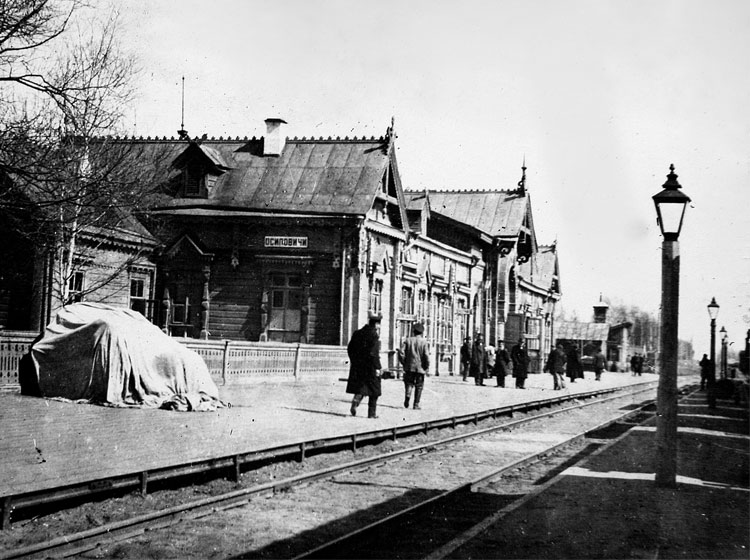 Беларуская (тарашкевіца): Асіпавічы (Asipavičy), вуліца Вакзальная (vulica Vakzalnaja). Чыгуначная станцыя